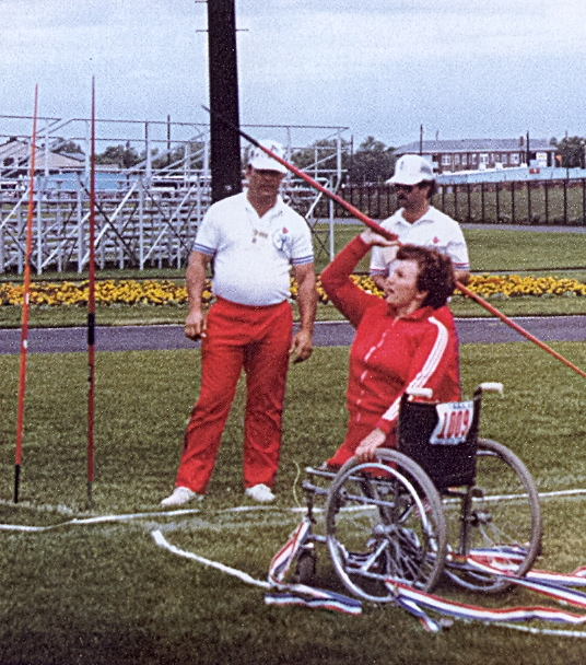 Start na Igrzyskach Paraolimpijskich - USA 1984